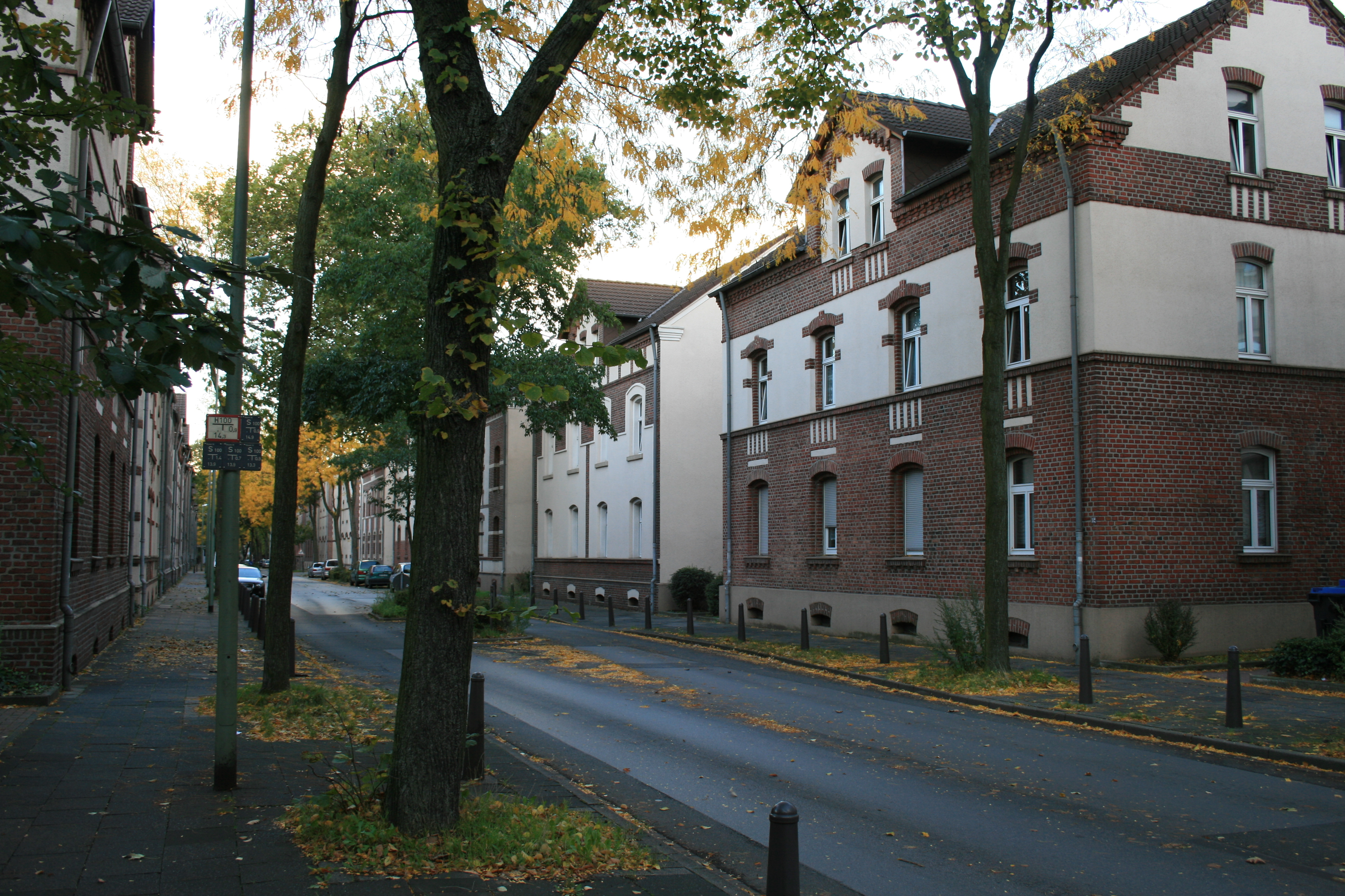 Dichterviertel, Schillerstr.